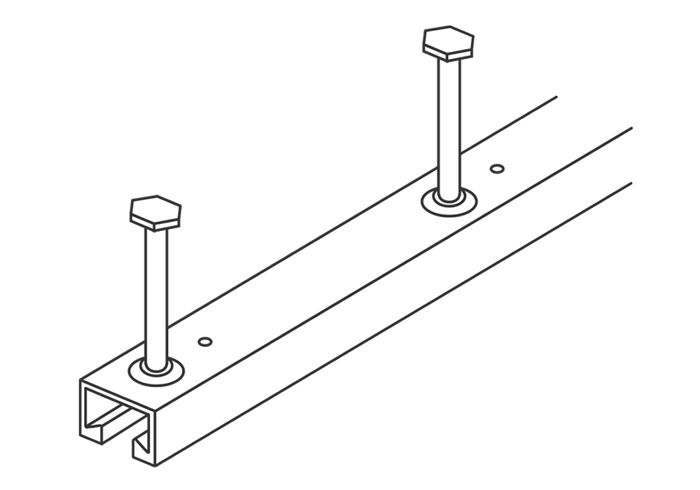 Warmgewalzte ATC Ankerschienen Skizze von ancotech.